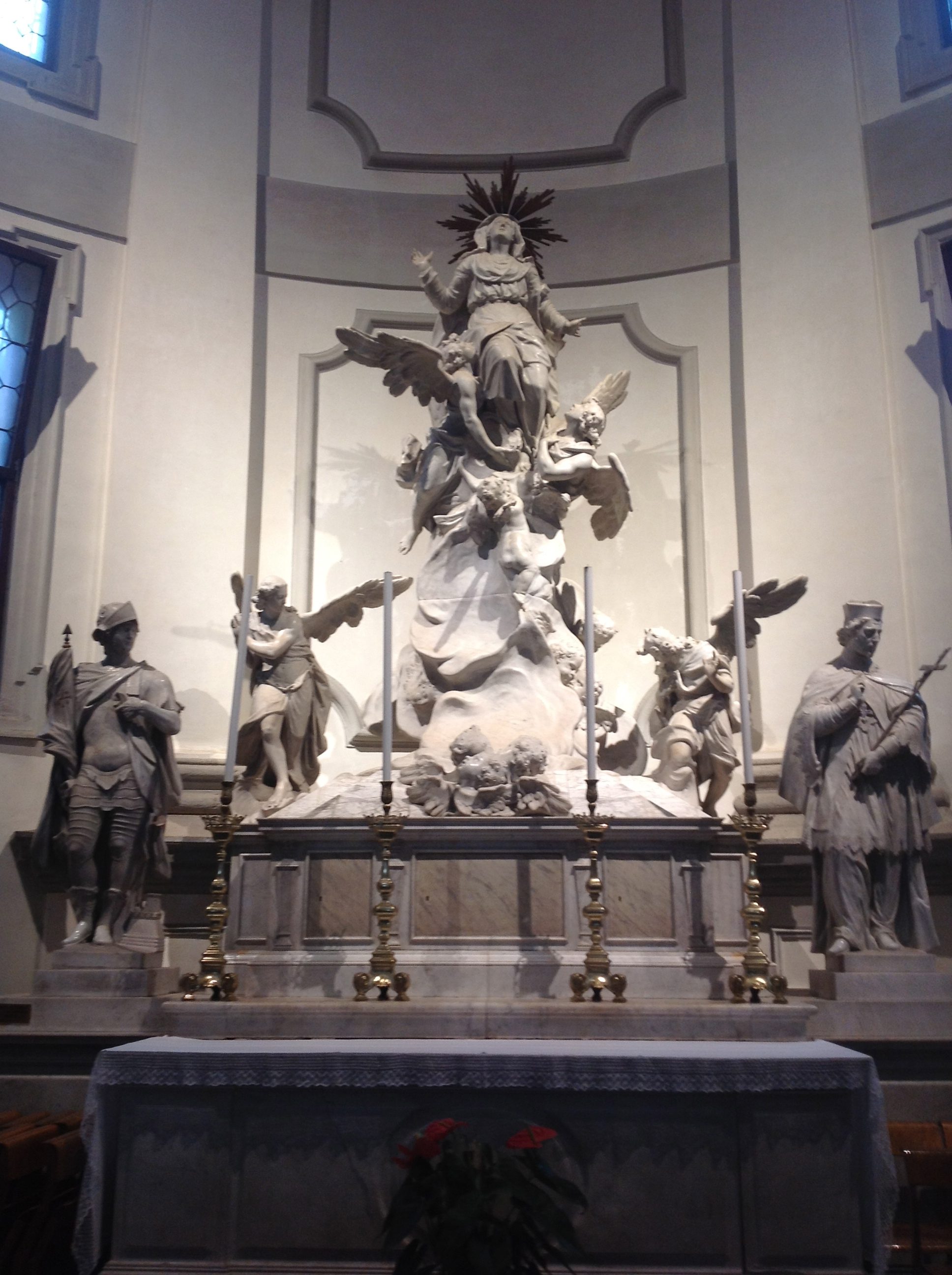 von Wolken und Engeln getragene Himmelfahrt Mariä und heilige Liberalis of Treviso und Johannes Nepomuk